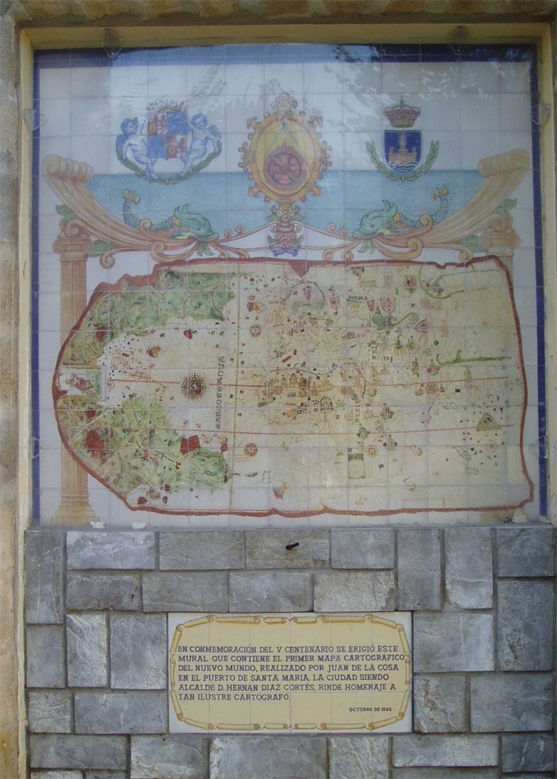 Azulejos conmemorativos del V Centenario en El Puerto de Santa María, España.